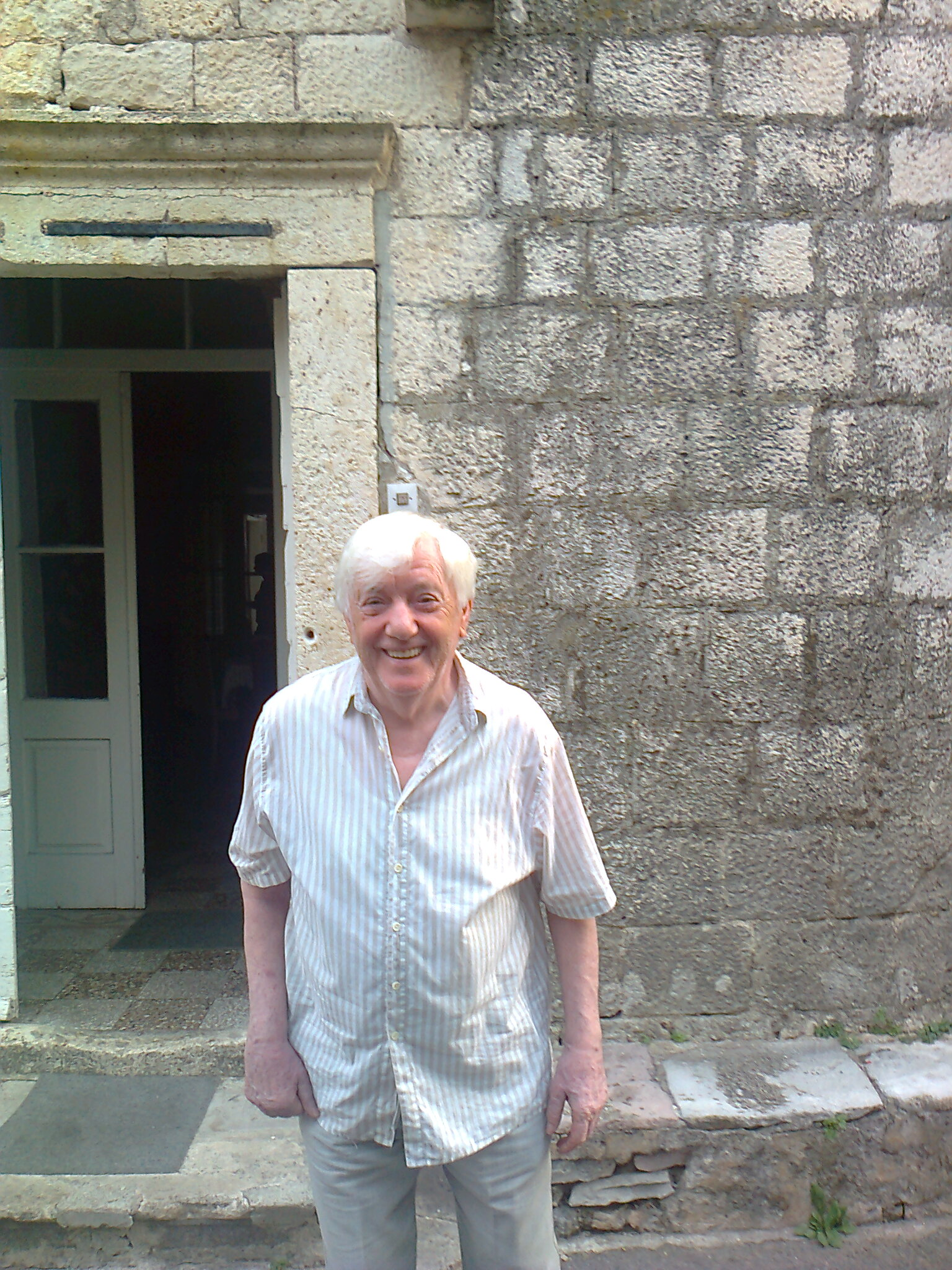 Slika je u mom vlasništvu, tj. ja sam slikao legendu Đorđa Marjanovića, slobodno se može koristiti i u bilo koje svrhe pod jednim uslovom da se navede da sam autor slike.